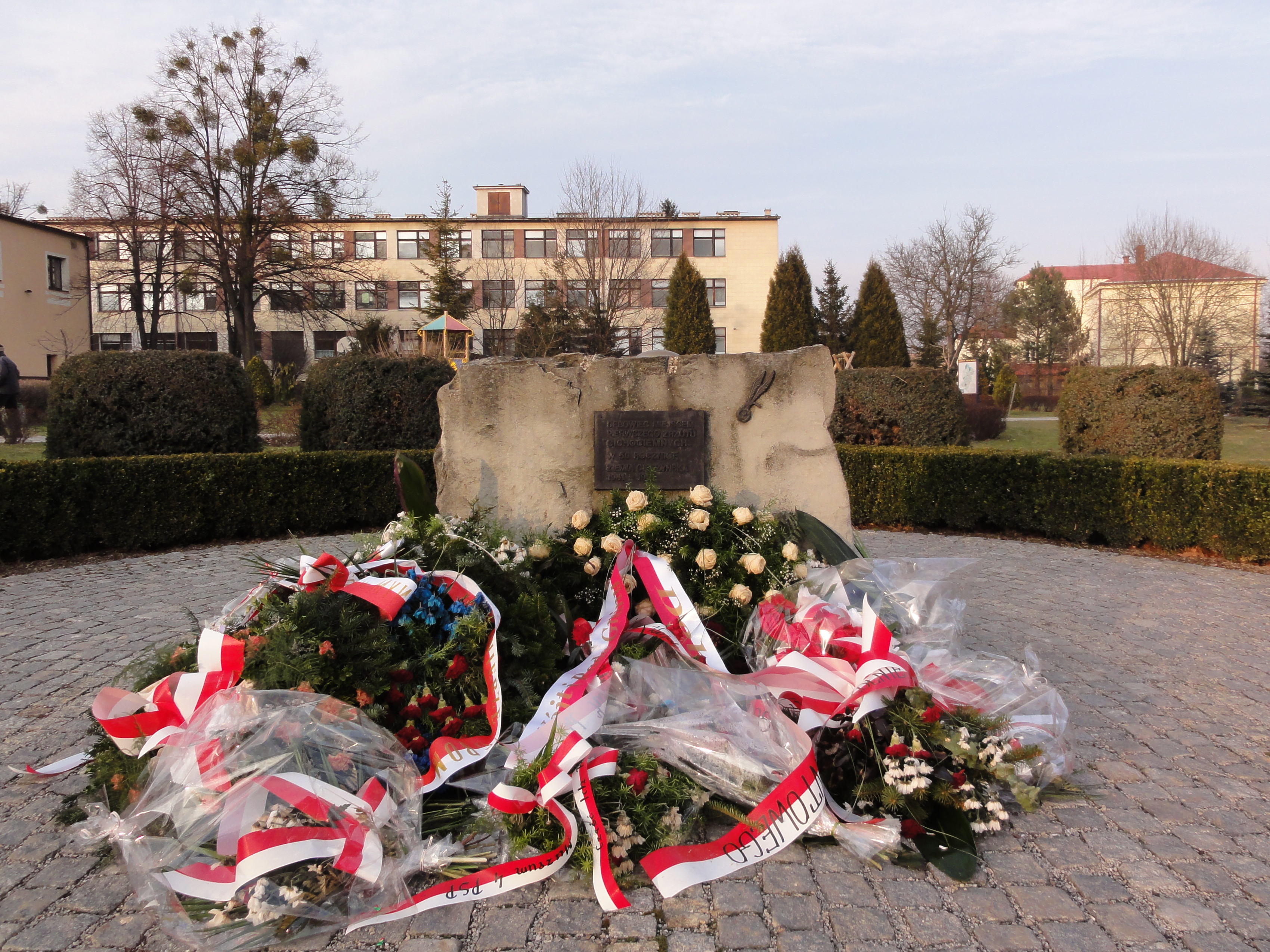 Pomnik Cichociemnych w Dębowcu obłożony kwiatami po 60. rocznicy zrzutu